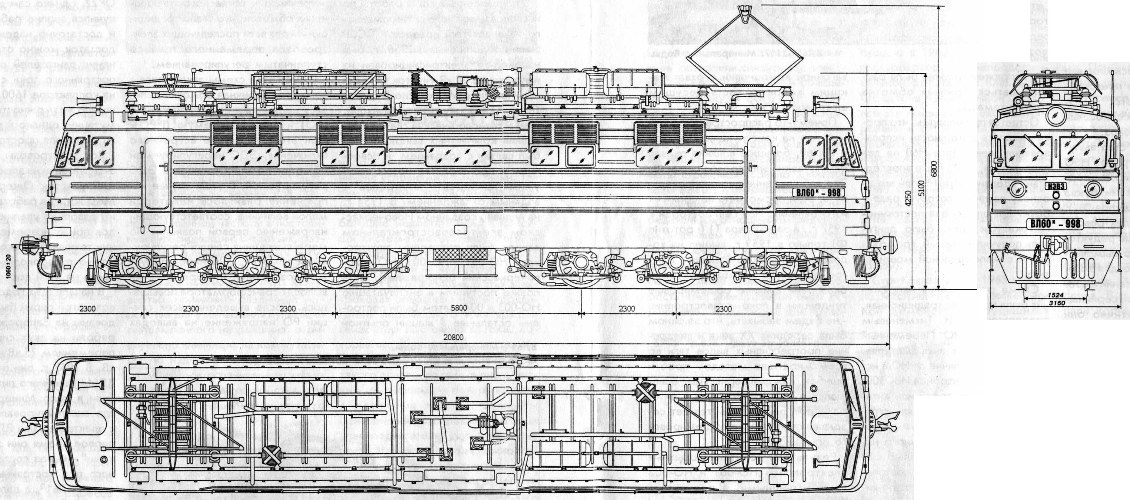 Основные размеры электровоза ВЛ60 № 998 1963 года выпуска